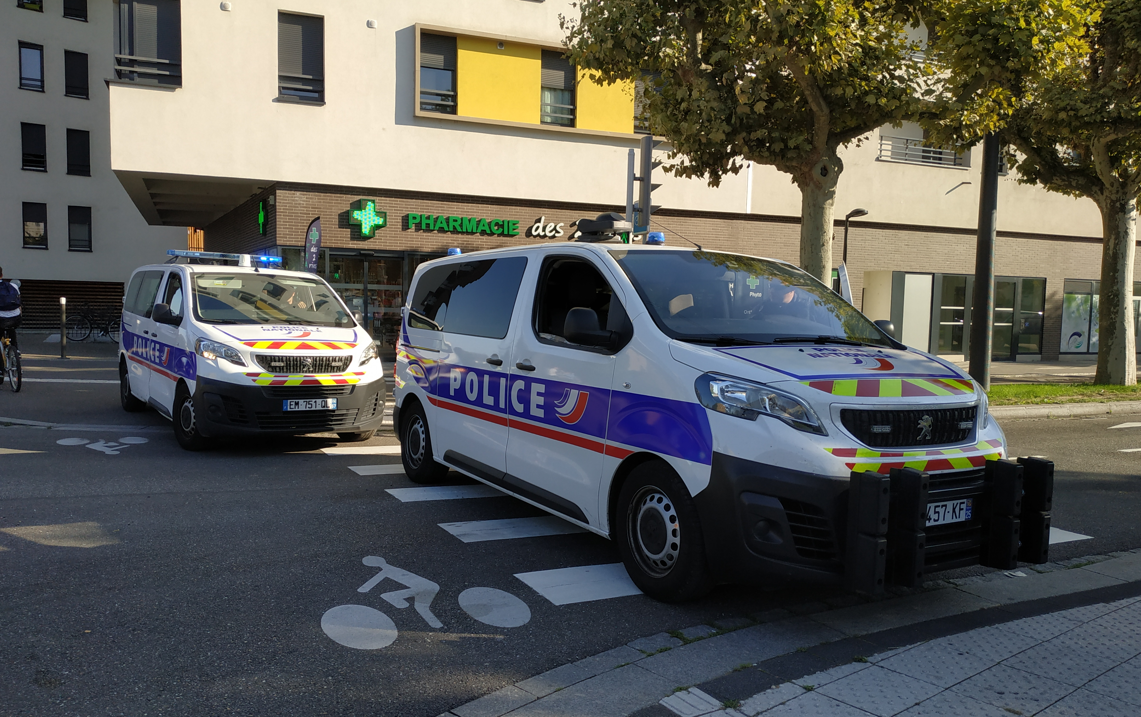 Fourgons Peugeot Traveller de la police nationale (CSI entre autres), lors du match Racing-Eintracht Francfort à Strasbourg (22 août 2019)